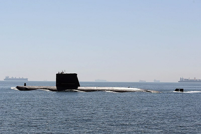 حشمت - رزمایش مشترک دریایی ایران و پاکستان در تنگه هرمز